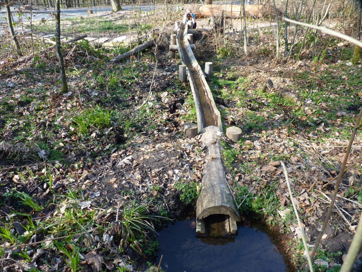 der richtige Quellaustritt der Sieg